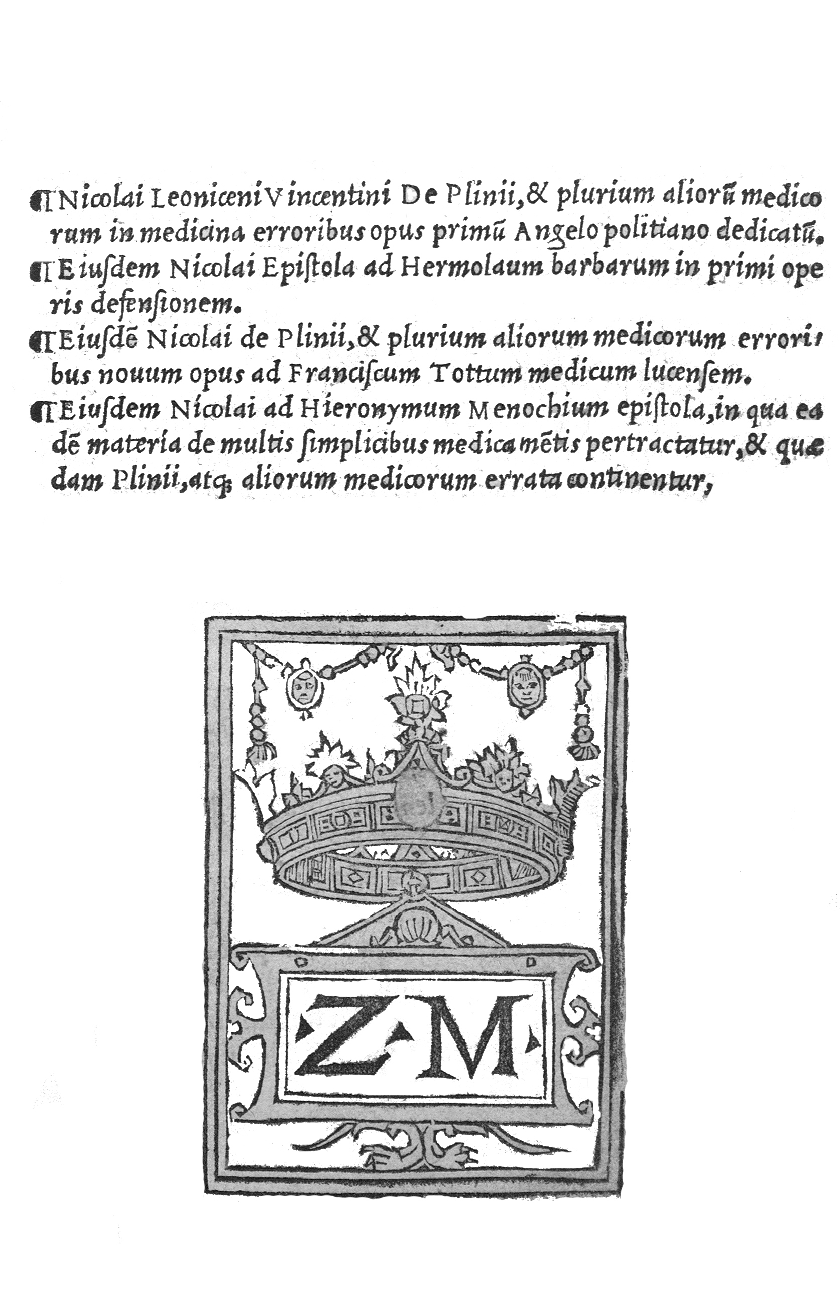 Titelblatt